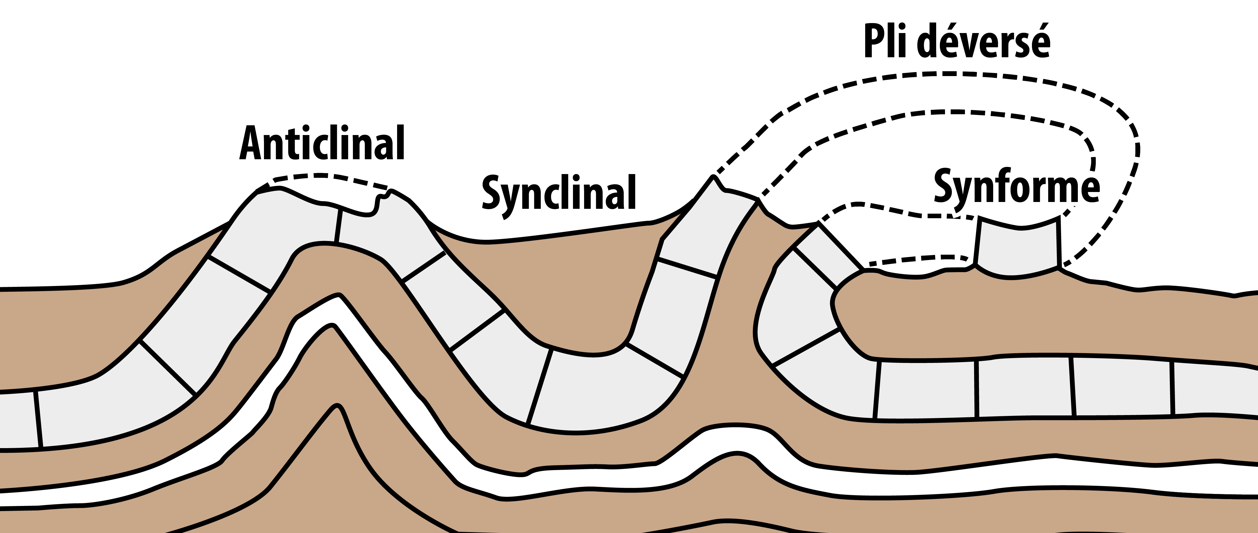 inspiré de